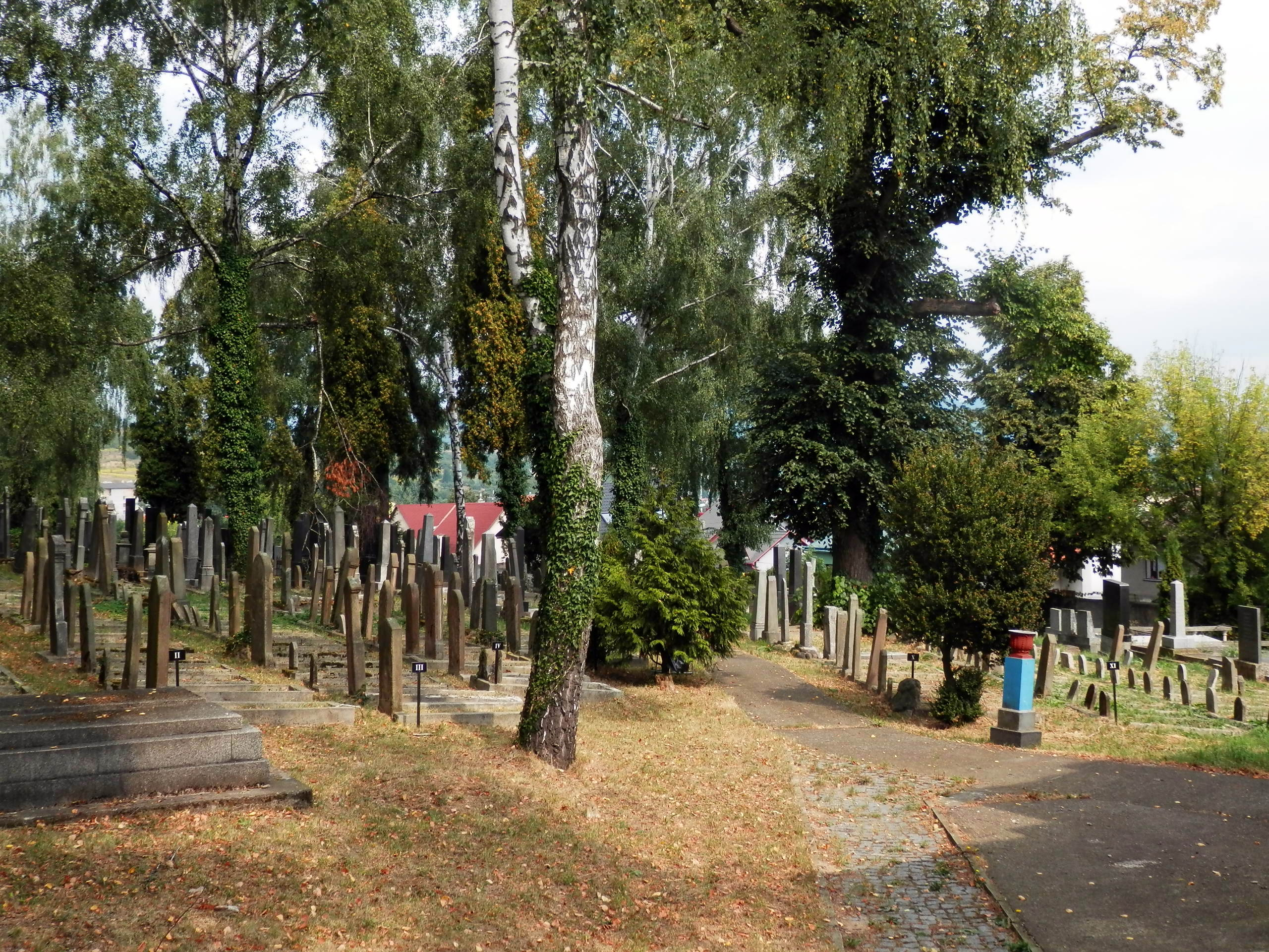 Cintorín židovský - neologický; Beth Olam s asi 750 náhrobnými pomníkmi. Ulica Krátka, mesto Prešov.